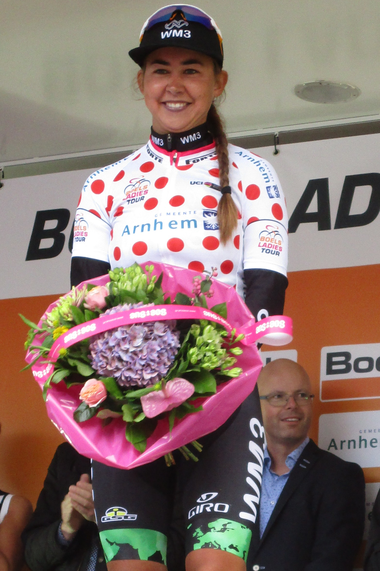 Huldiging van de winnaars van de 5e etappe van de Boels Ladies Tour 2017 in Vaals.